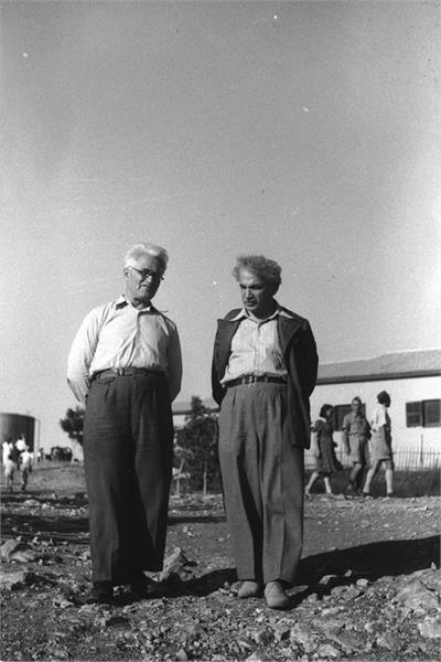 מעלה החמישה - ברל כצנלסון ואברהם הרצפלד בחגיגות יובל ה-5